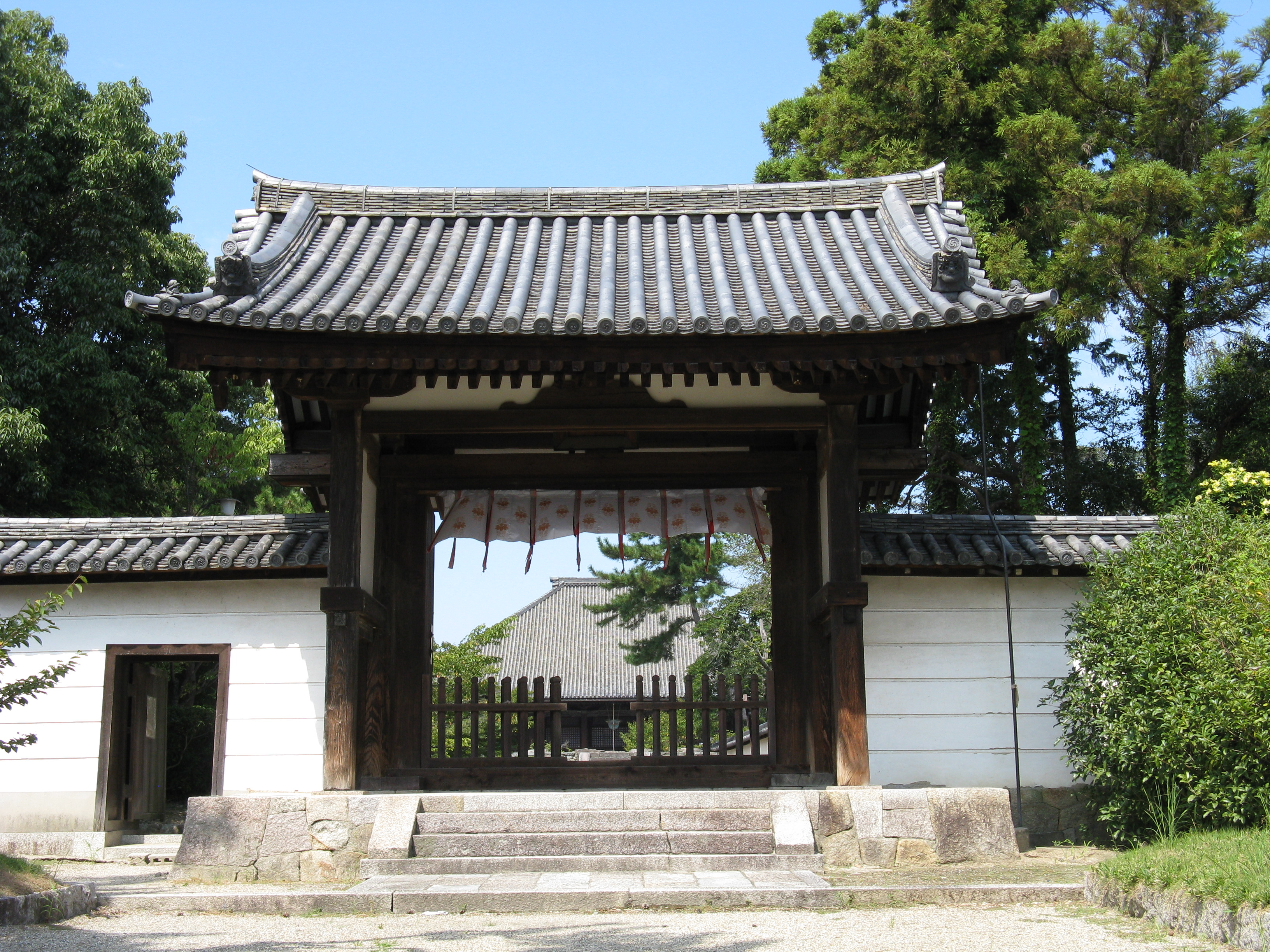 西大寺 南門